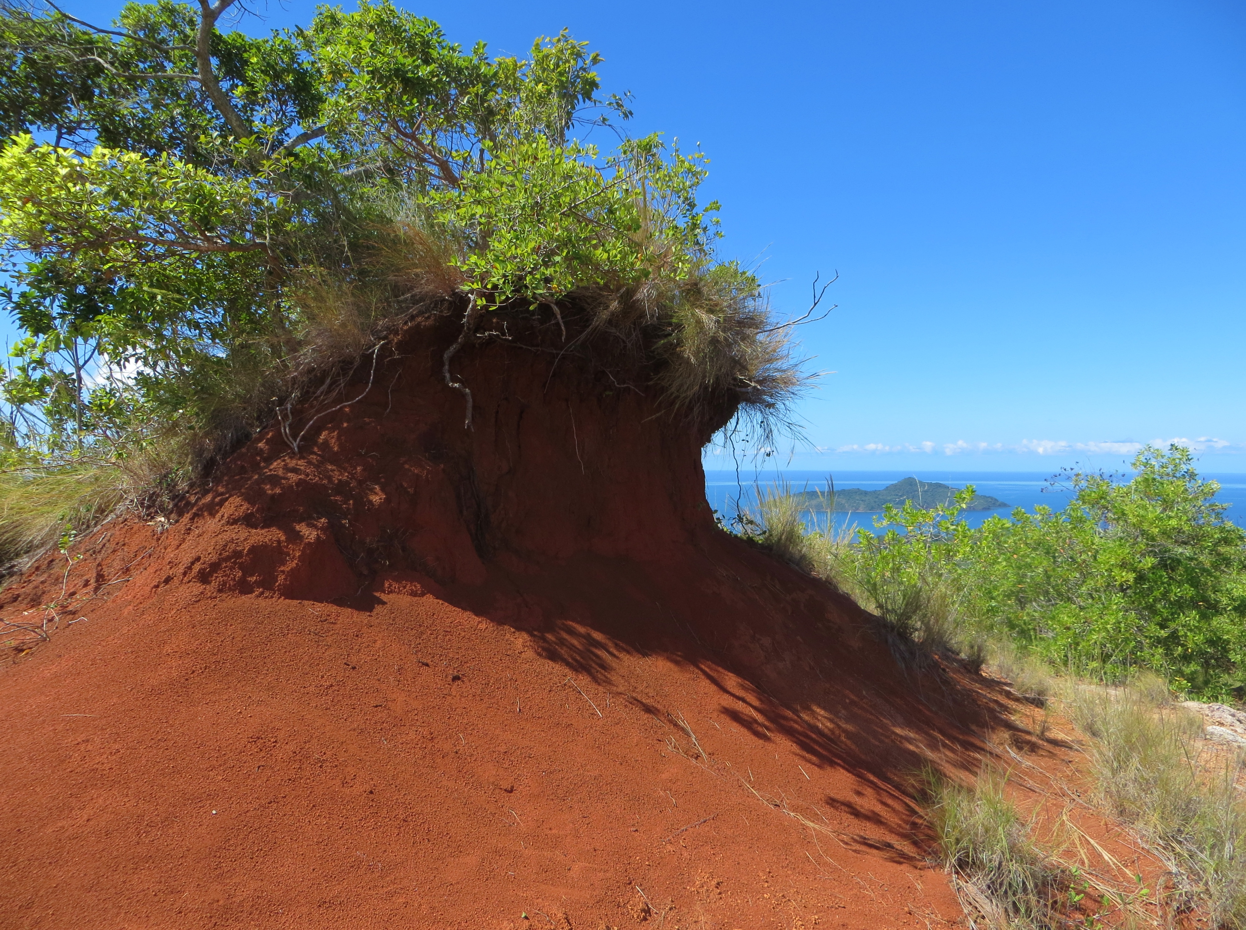 Sommet érodé d'un "padza" des hauteurs de Vahibé (près de Passamaïnty), à Mayotte.